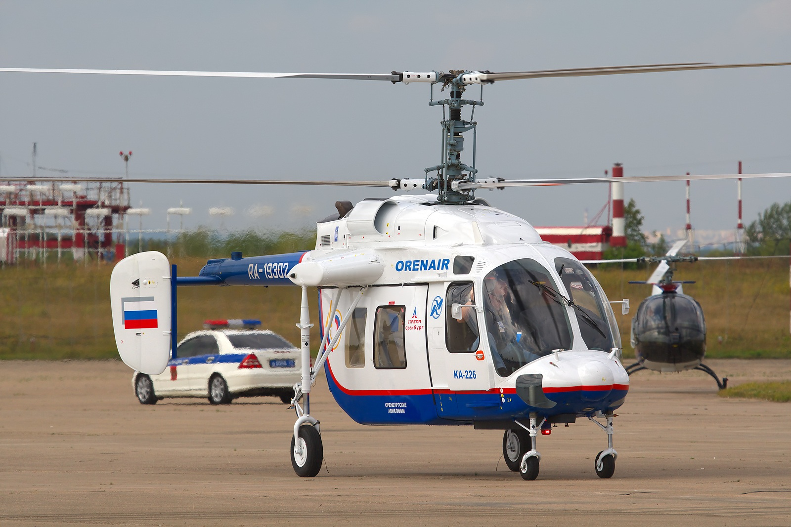 Kamov Ka-226 Moscow - Zhukovsky (Ramenskoye) (UUBW) Russia, August 18, 2009 RA-19302 (cn 019) The second reincarnation of the good old Ka-26